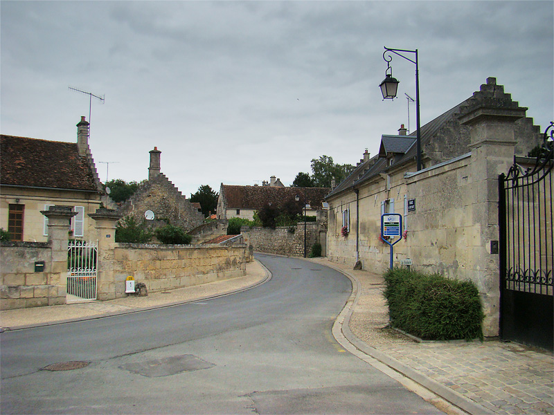 Septmonts, Aisne, Picardie, France.